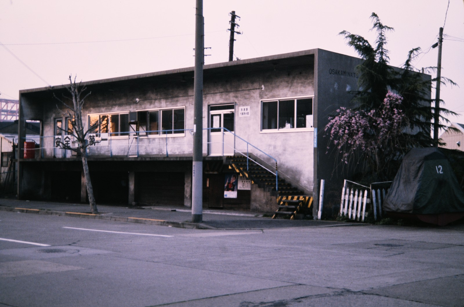 国鉄大阪港駅駅舎。駅としては廃止後の浪速駅大阪港分室時代の姿。